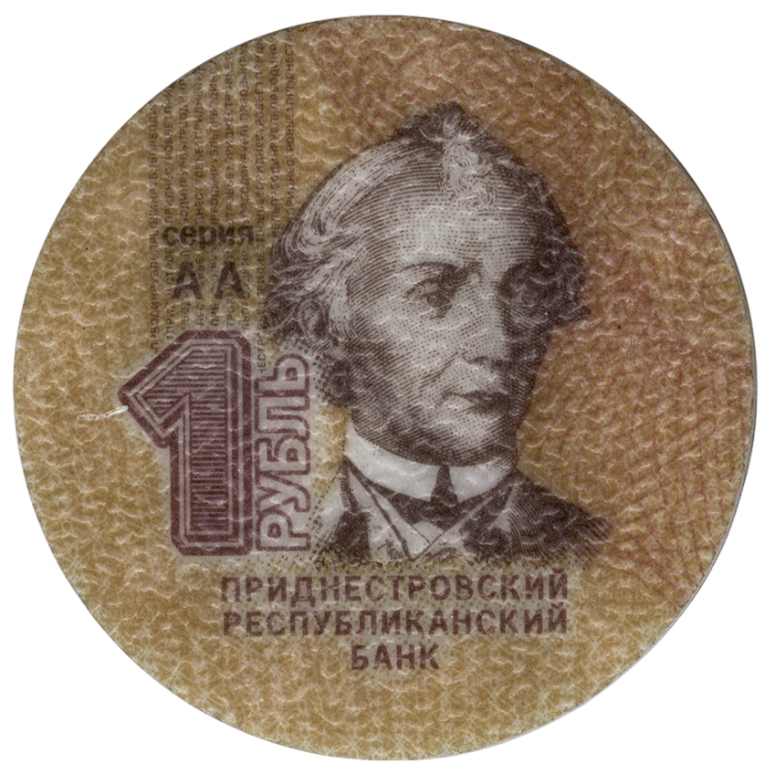 Kursmünze 1 Rubel Prednistrowien Avers Durchmesser 26 mm Masse 0,88 g Dicke: 1,16 mm Komposit- Plaste